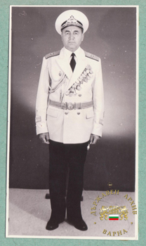 Снимка на контраадмирал Вълчо Желев